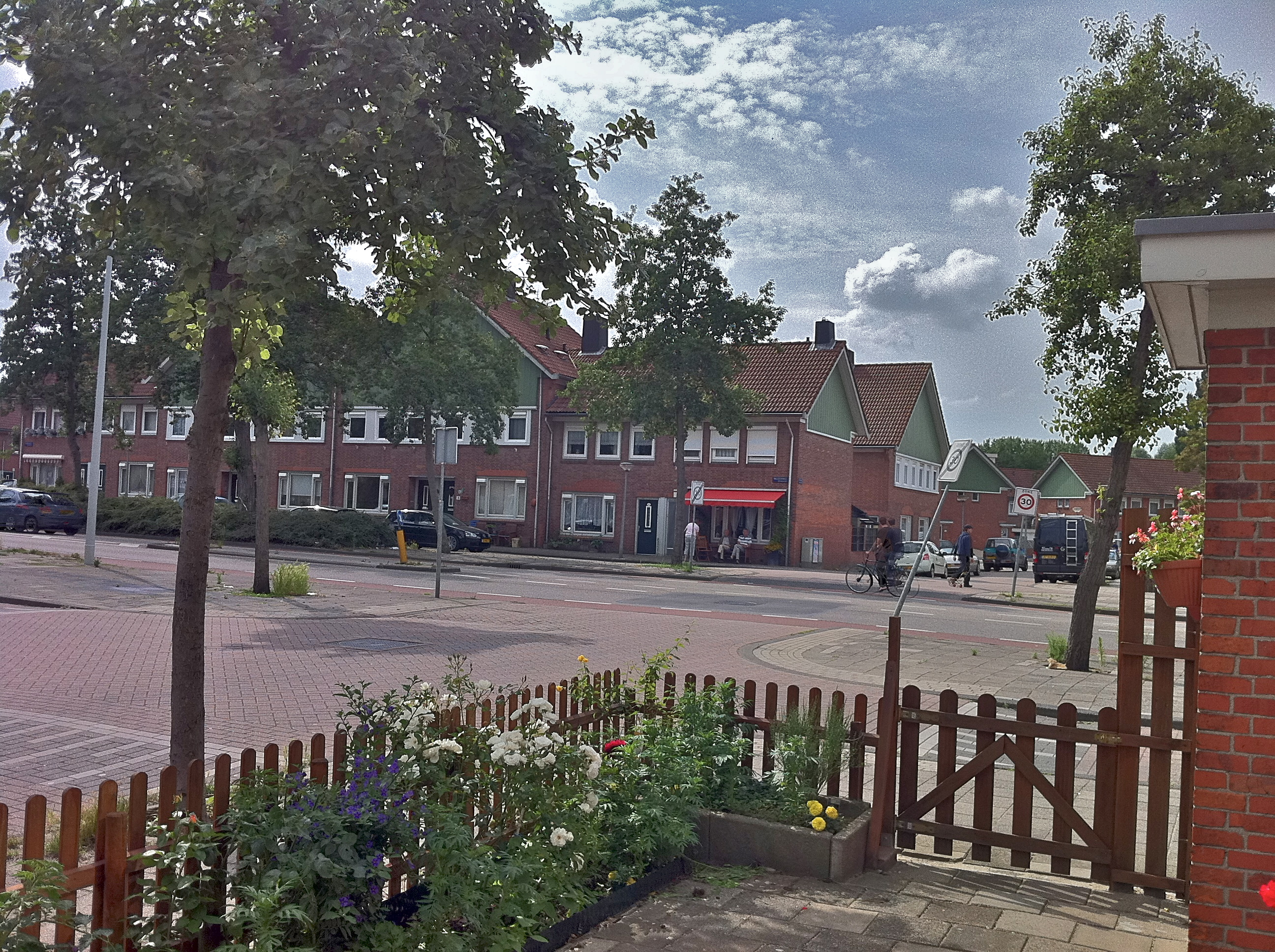 Tuindorp Buiksloot Amsterdam-Noord juli 2011